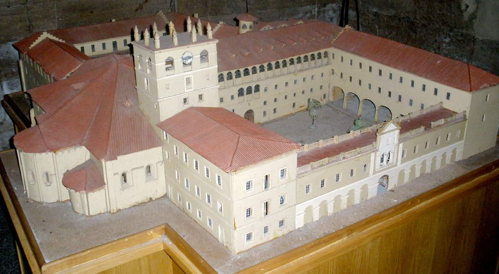 Bugedo (Burgos) - Monasterio de Santa María de Bujedo de Candepajares, claustro